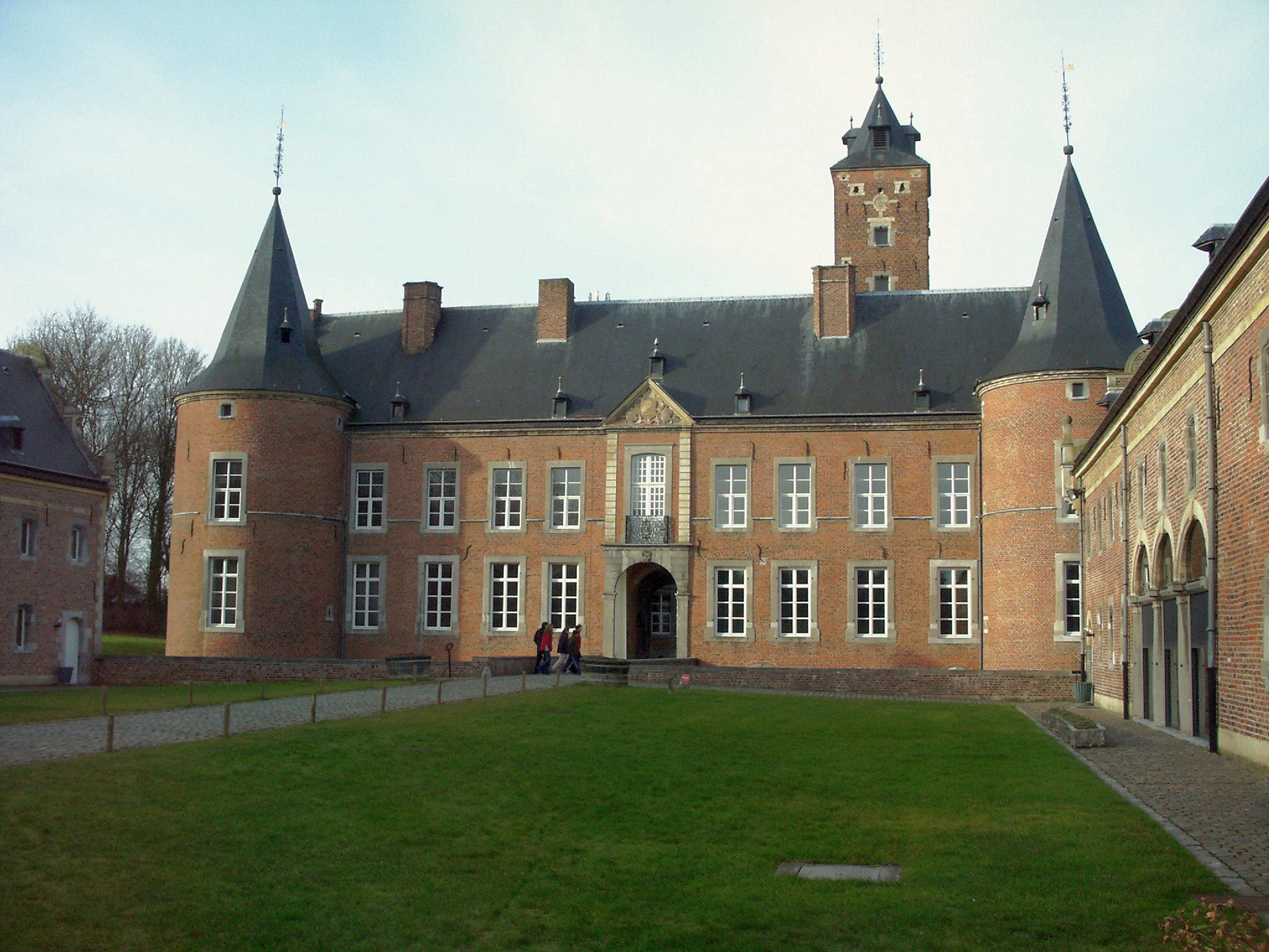 Modell Schloss Alden Biesen